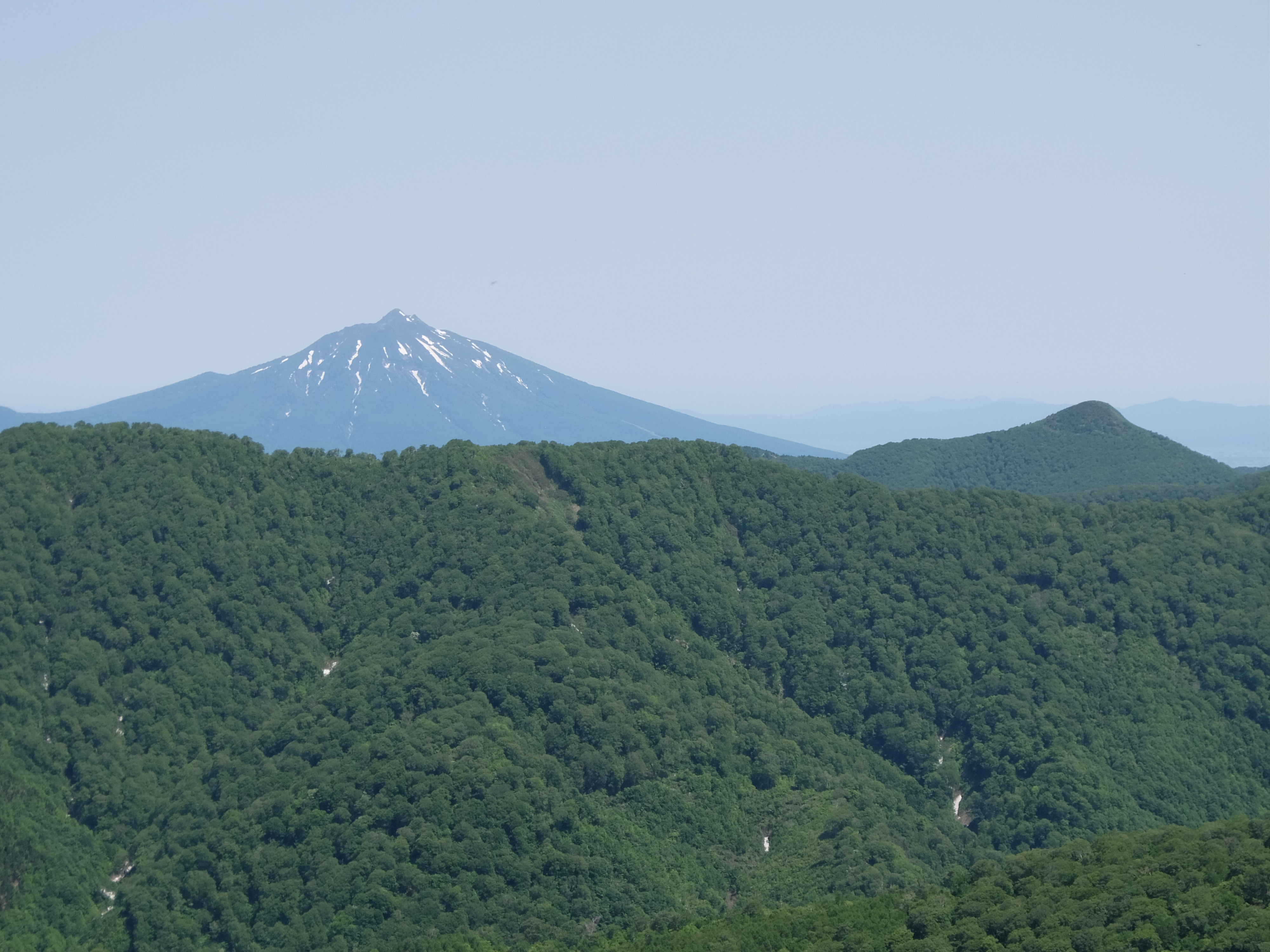 岩木山と尾太岳